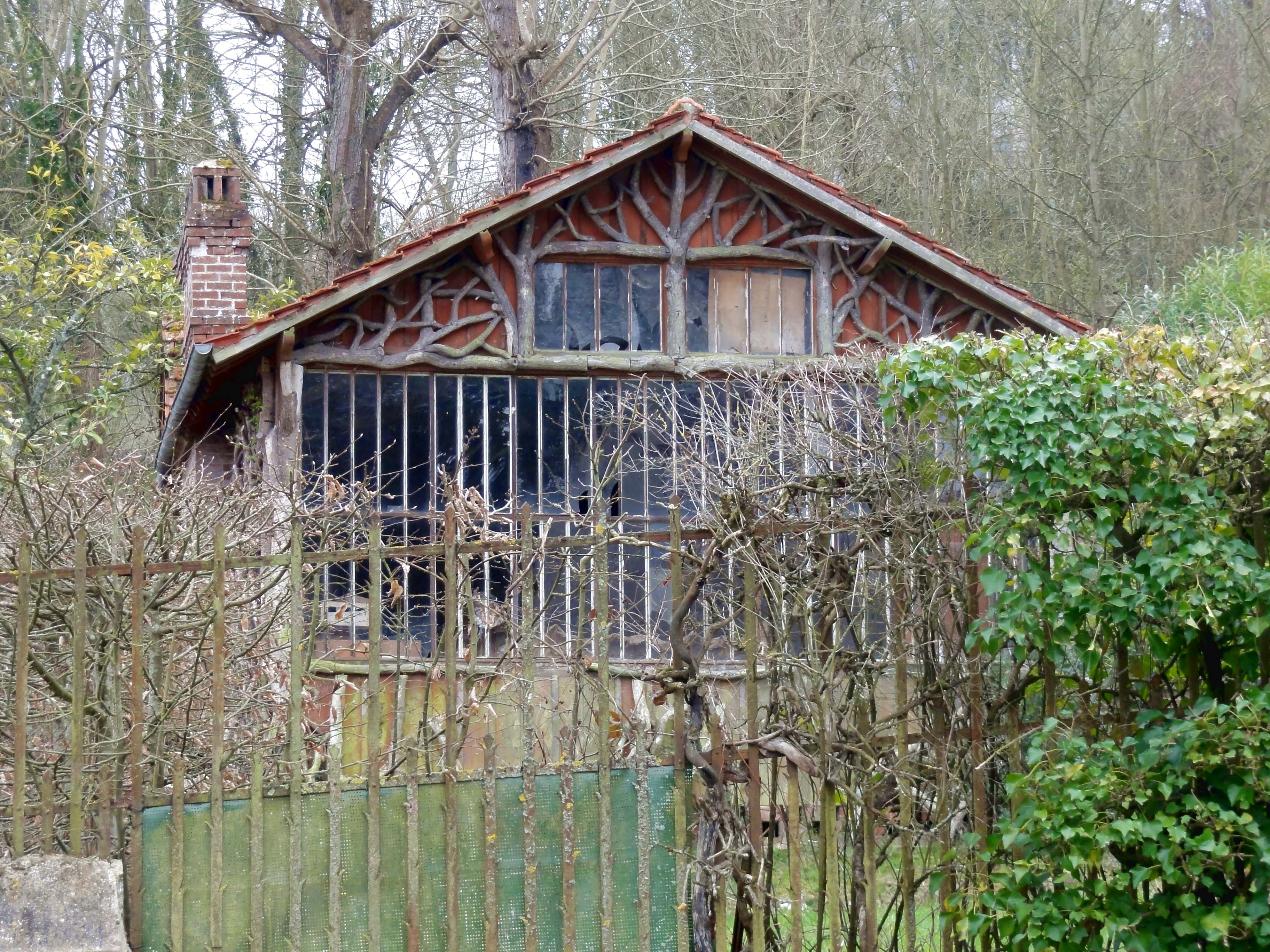 Ancien atelier photographique maison de Félix Martin-Sabon, face à l'église.